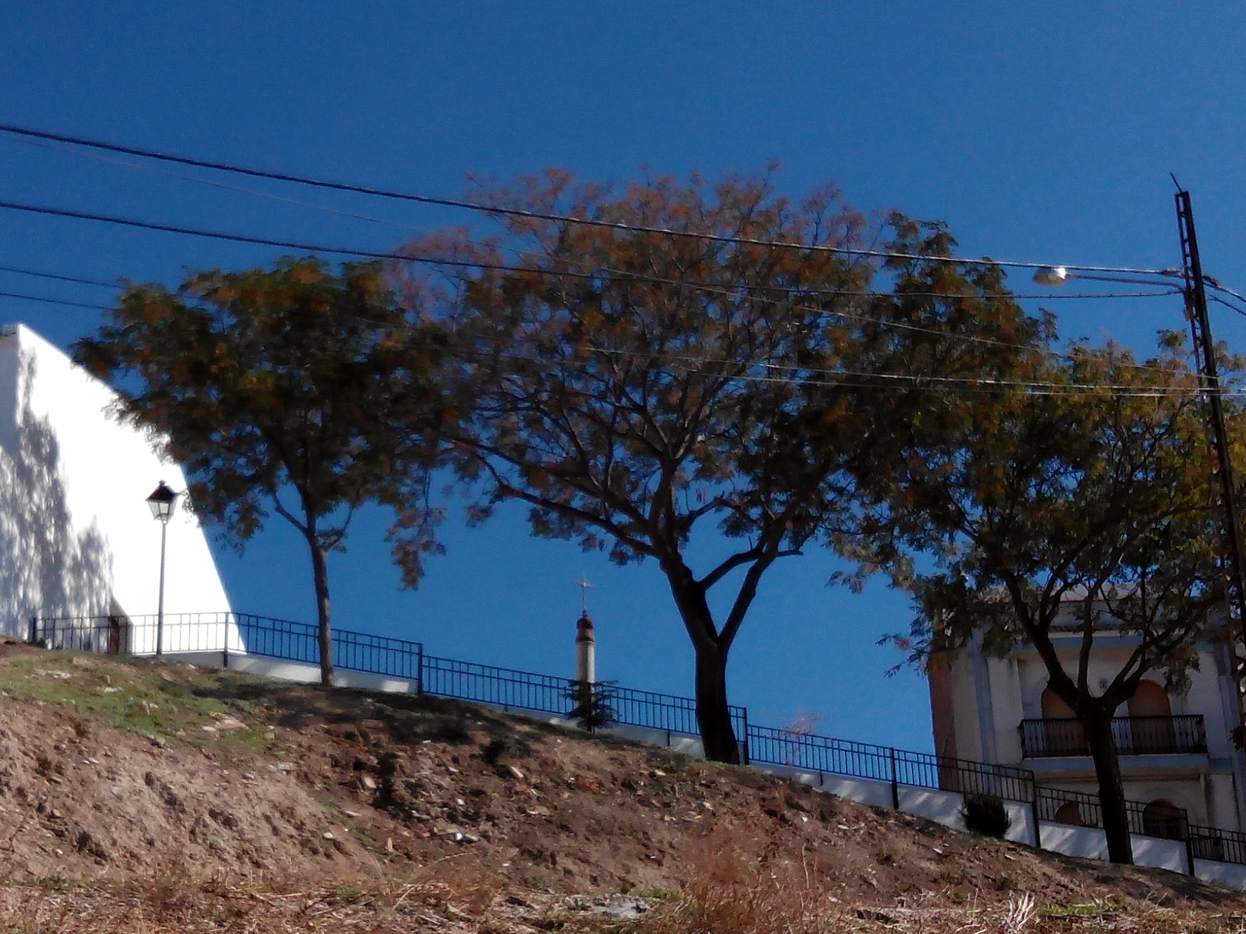 Mirador de la Cruz de San Antonio, Montalbán de Córdoba (España).